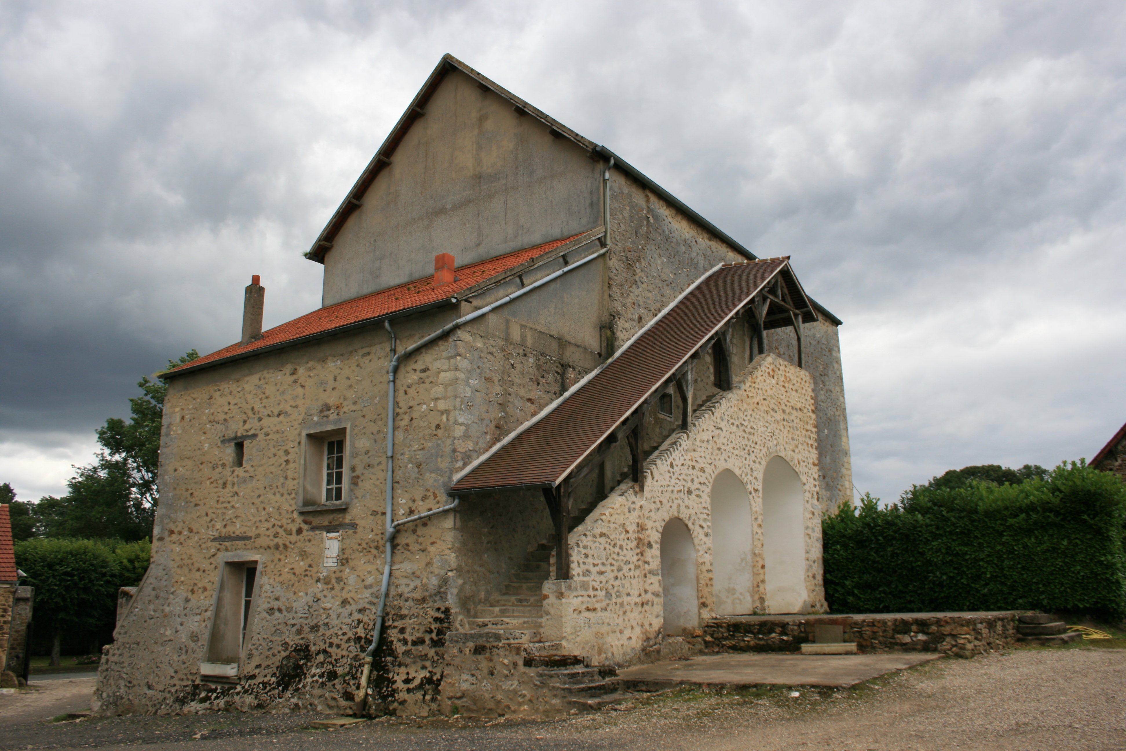 Maison-forte construite par les Templiers entre 1197 et 1205 à Aincourt, dans le Vexin français. Inscrite au registre des monuments historiques en 2003, elle est depuis au moins Napoléon 1er utilisé comme ferme. Unknown